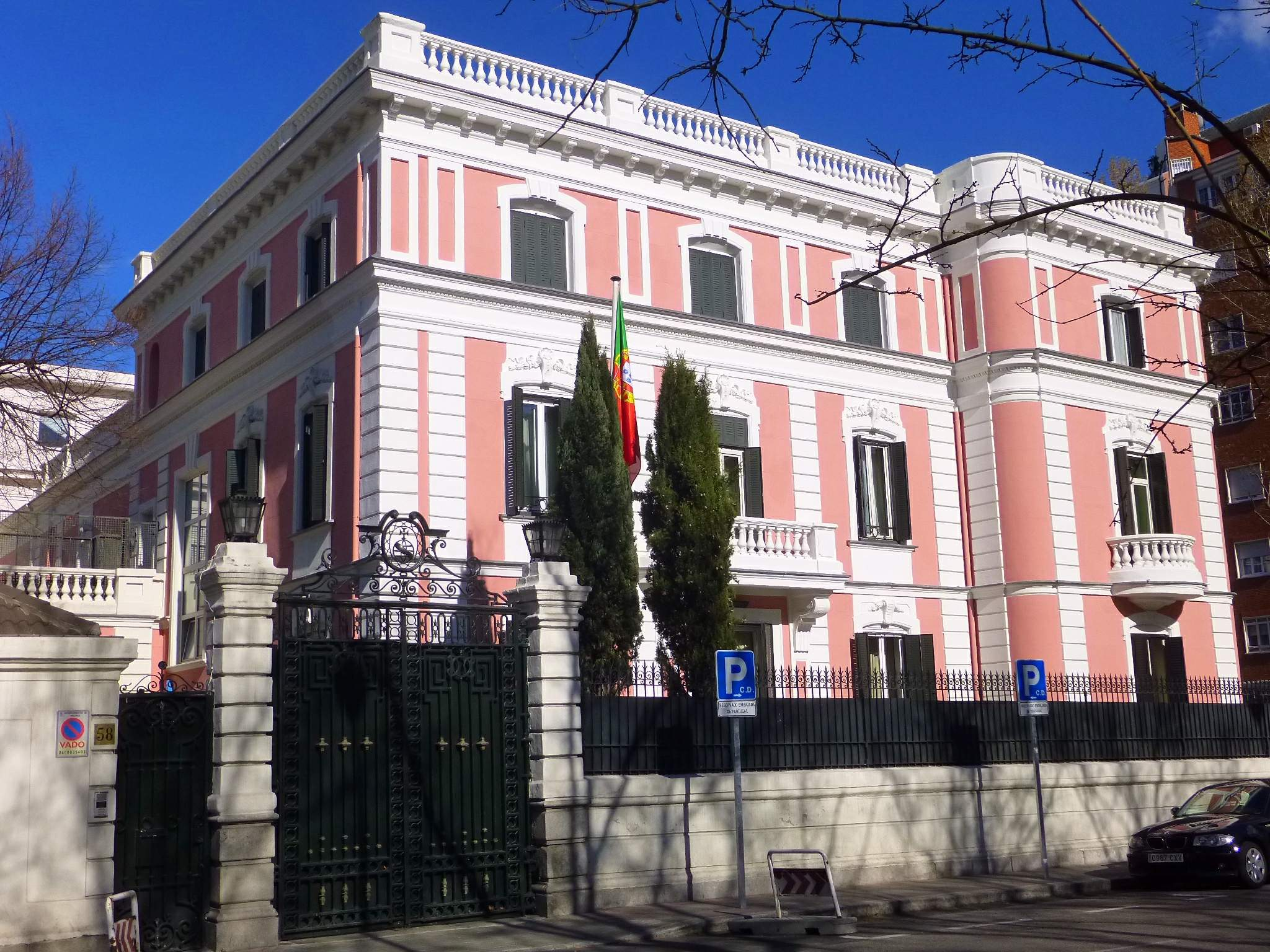 Madrid - Embajada de Portugal